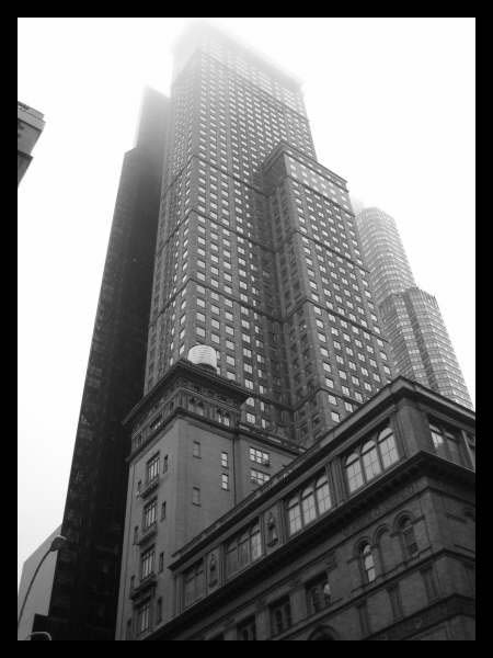 Carnegie Hall (photo personnel 2005)